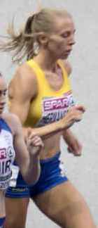 EKB52966 1500m dames finale